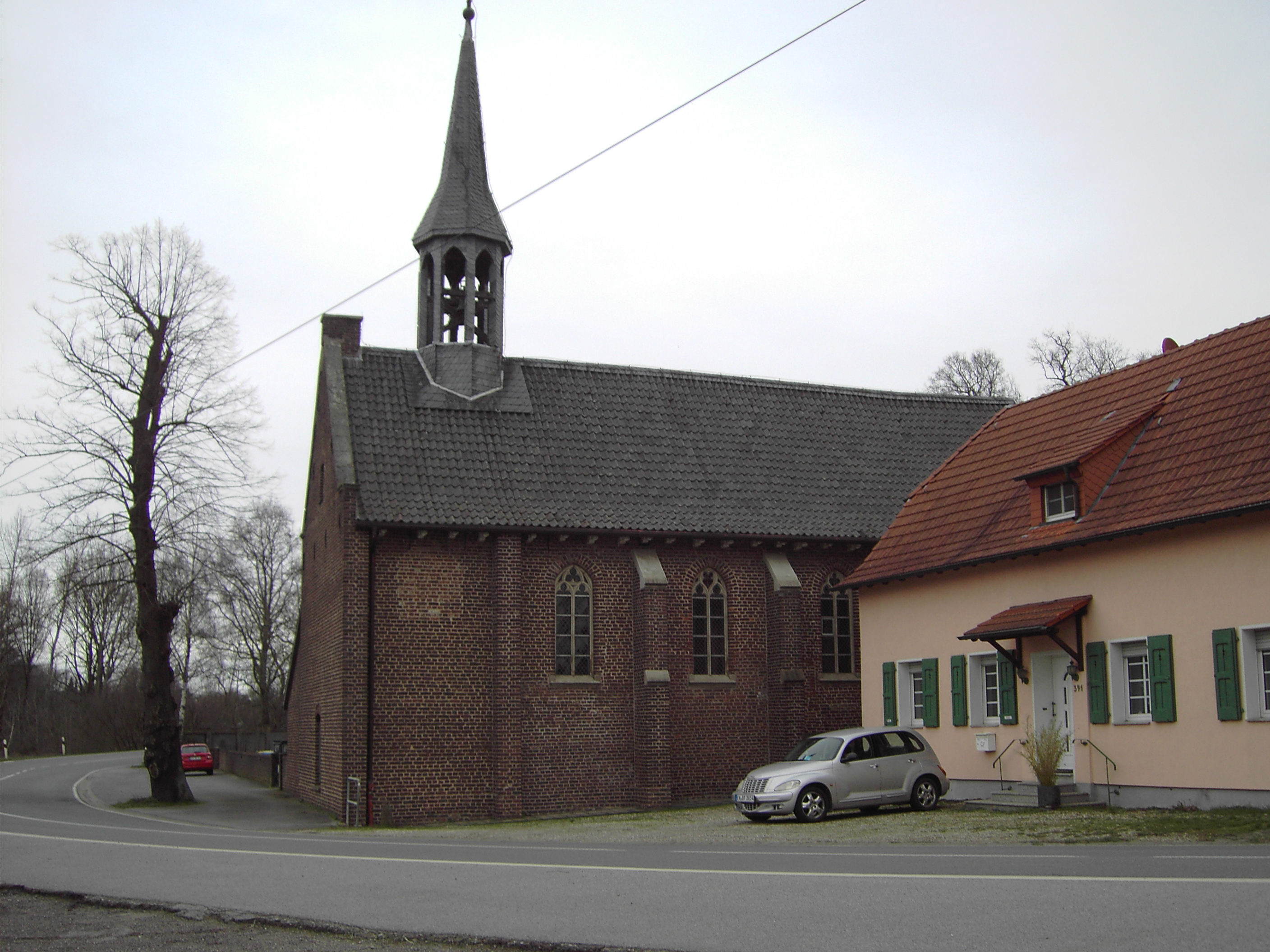 Mariä Himmelfahrt Kirche Eyll bei Haus Eyll am Eyller Berg bei Kamp-Lintfort